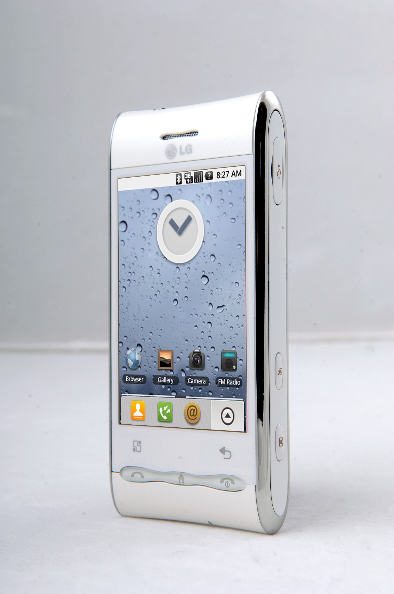 LG전자의 두 번째 안드로이폰 스마트폰(LG GT540)